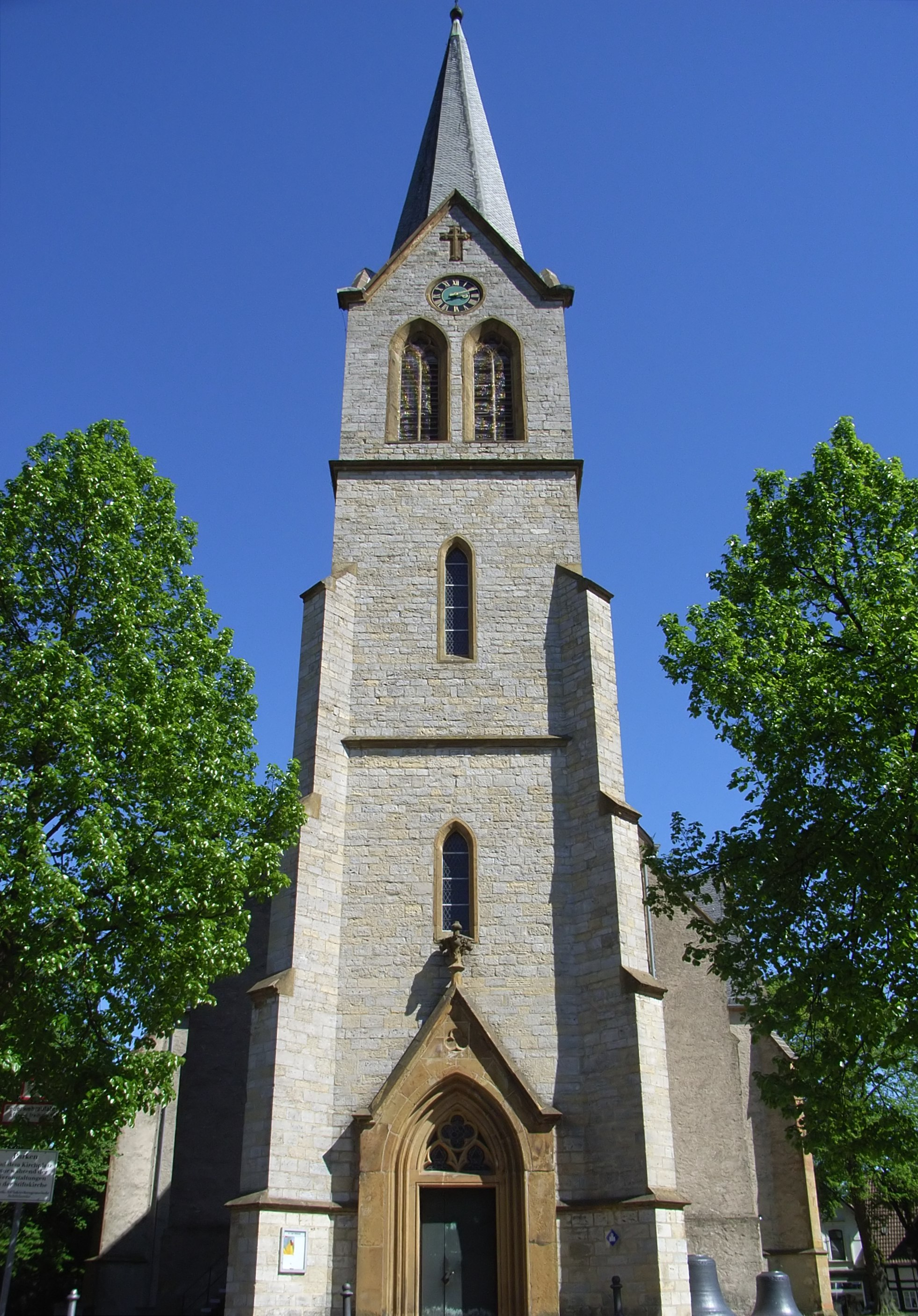 Bielefeld, Deutschland: Stiftskirche Schildesche.